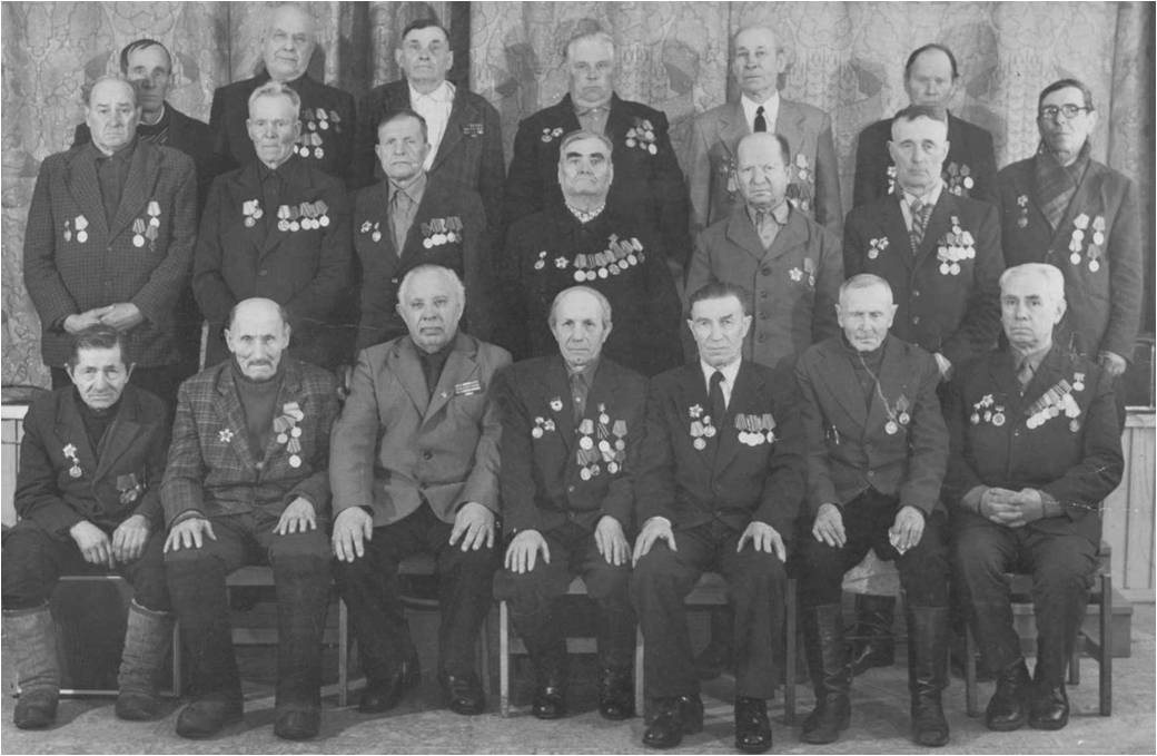 Дорогобужці ветерани ВВв